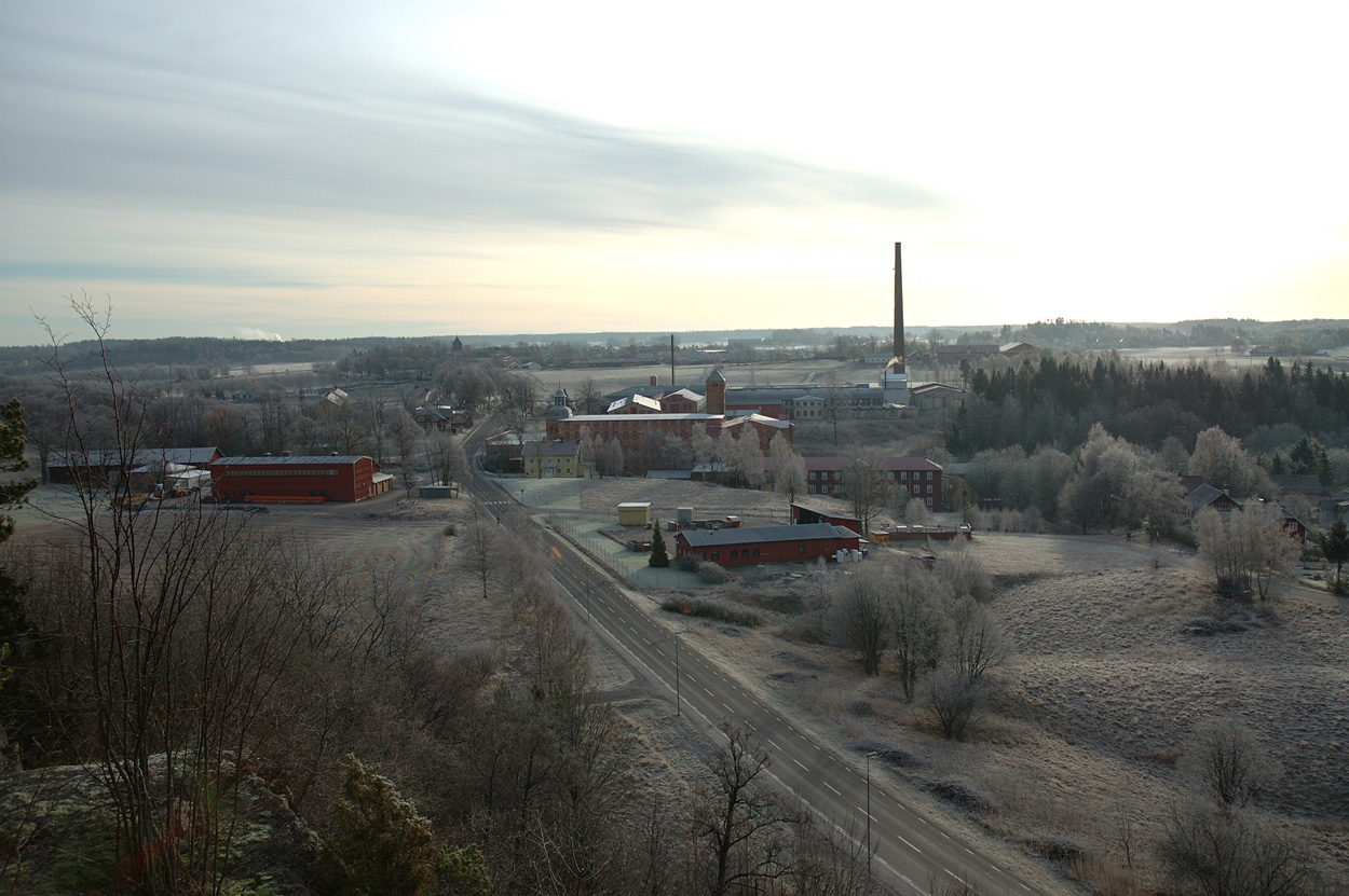 sjuntorp